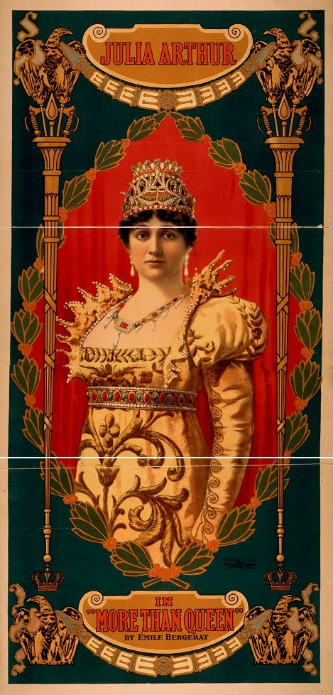 Julia Arthur in More Than Queen by Émile Bergerat. Original title and production: Plus que Reine, drame en 5 actes et un prologue, 7 tableaux, Paris, Théâtre de la Porte Saint-Martin, 28 mars 1899.